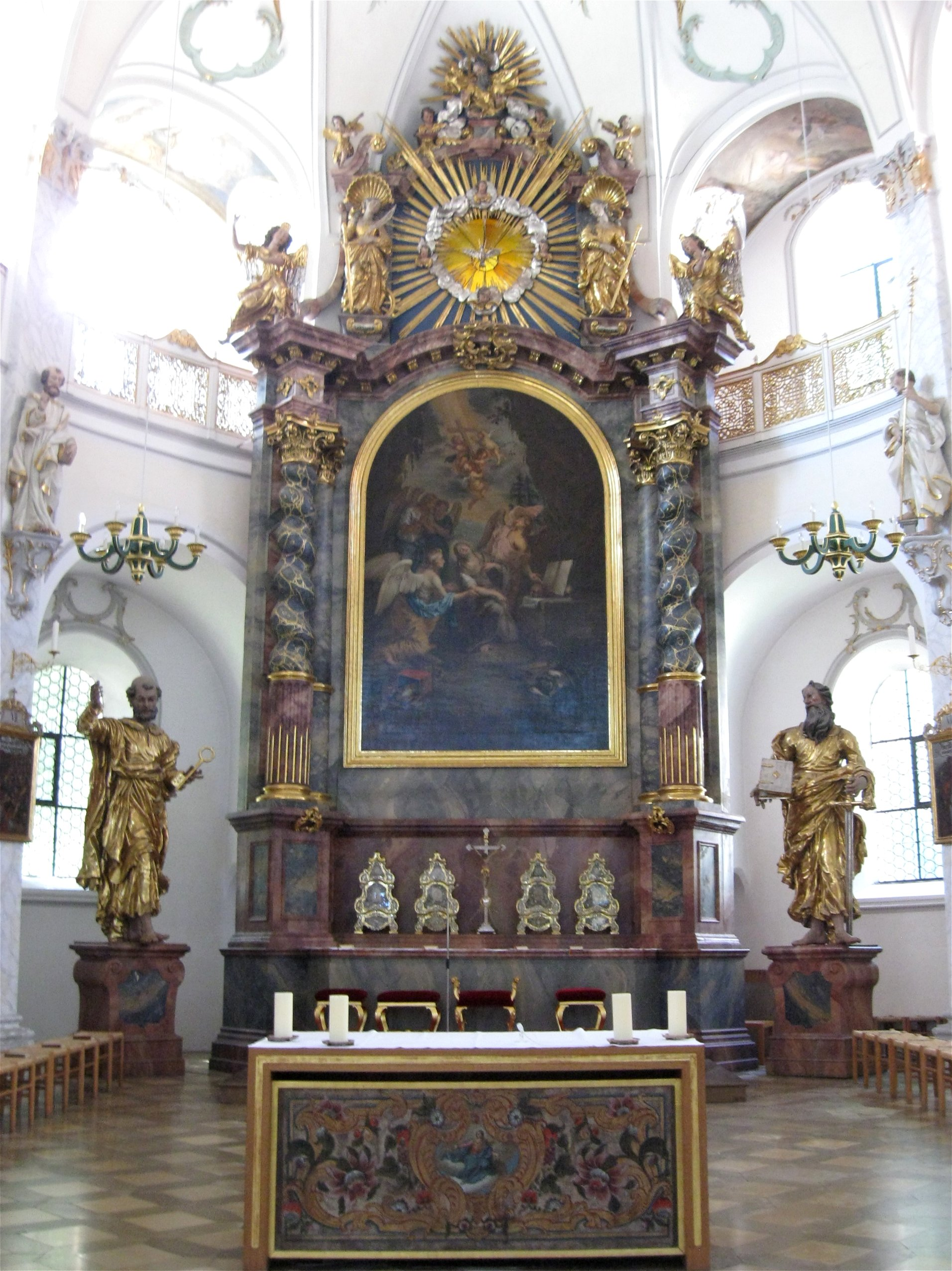 Kath. Stadtpfarrkirche St.Magdalena, Fürstenfeldbruck; barocker Wandpfeilerbau, Constantin Pader zugeschrieben, 1673. Hauptaltar